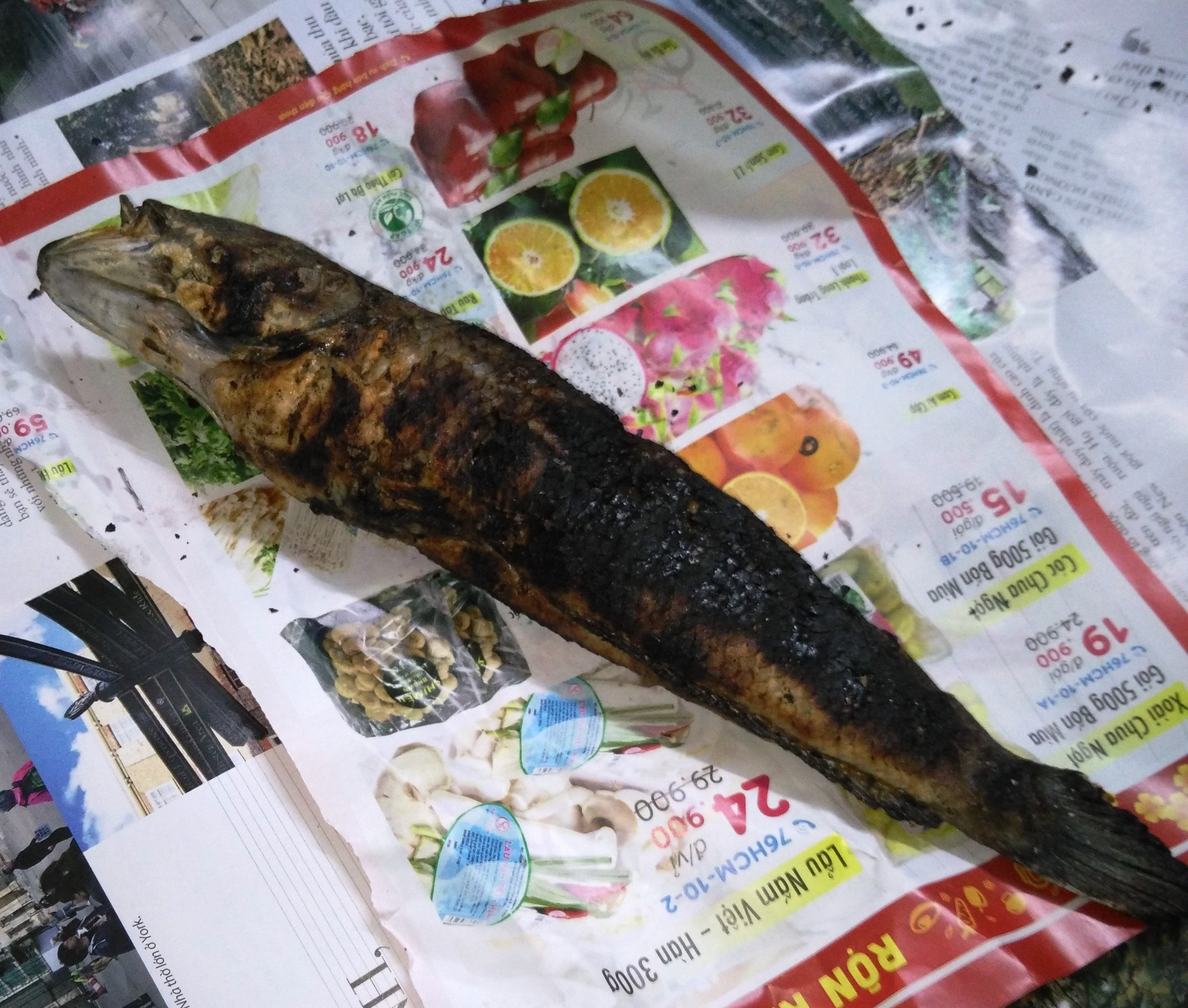 Hình tự chụp con cá lóc nướng để cúng Thần Tài vào ngày 25.02.2018 (nhằm ngày mồng mười tháng giêng) là ngày cúng Thần Tài